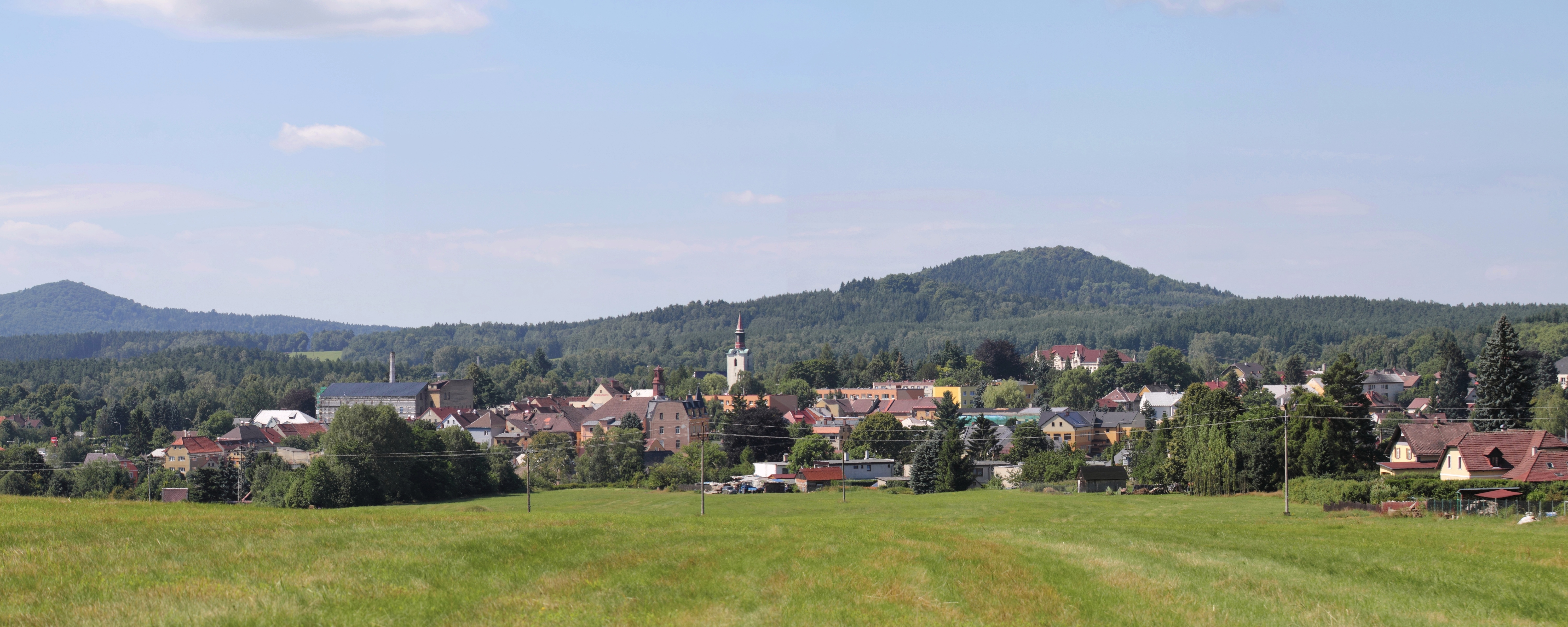 Cvikov